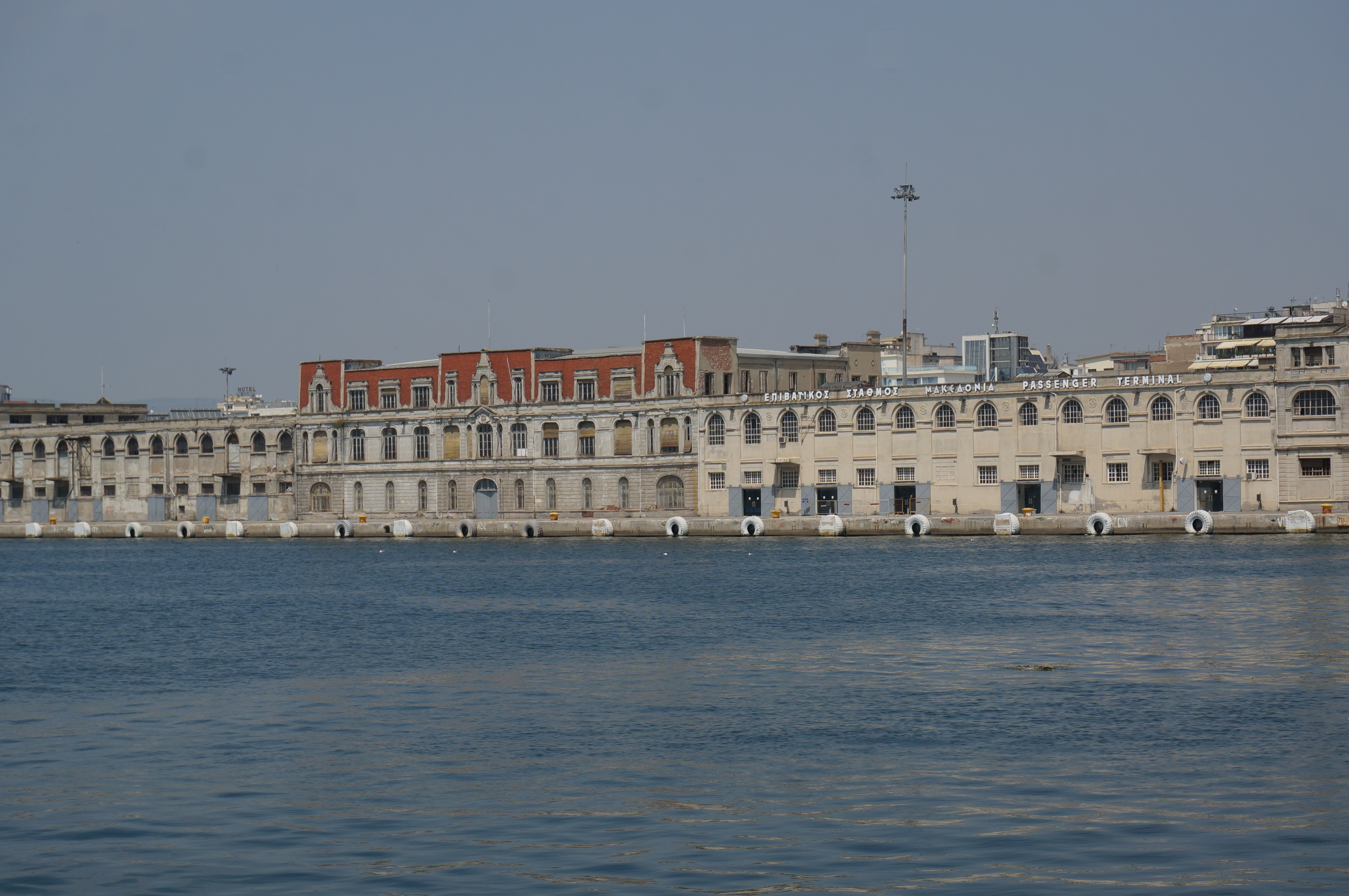 à Salonique.